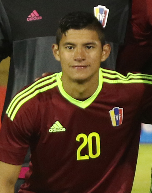 Quito, 2 feb (Andes).- La selección juvenil de Venezuela goleó 4-2 este jueves a su par de Ecuador, que comprometió seriamente sus opciones de clasificar al Campeonato Mundial Sub 20 Corea del Sur 2017, que se desarrollará en mayo próximo. ANDES/Micaela Ayala V.